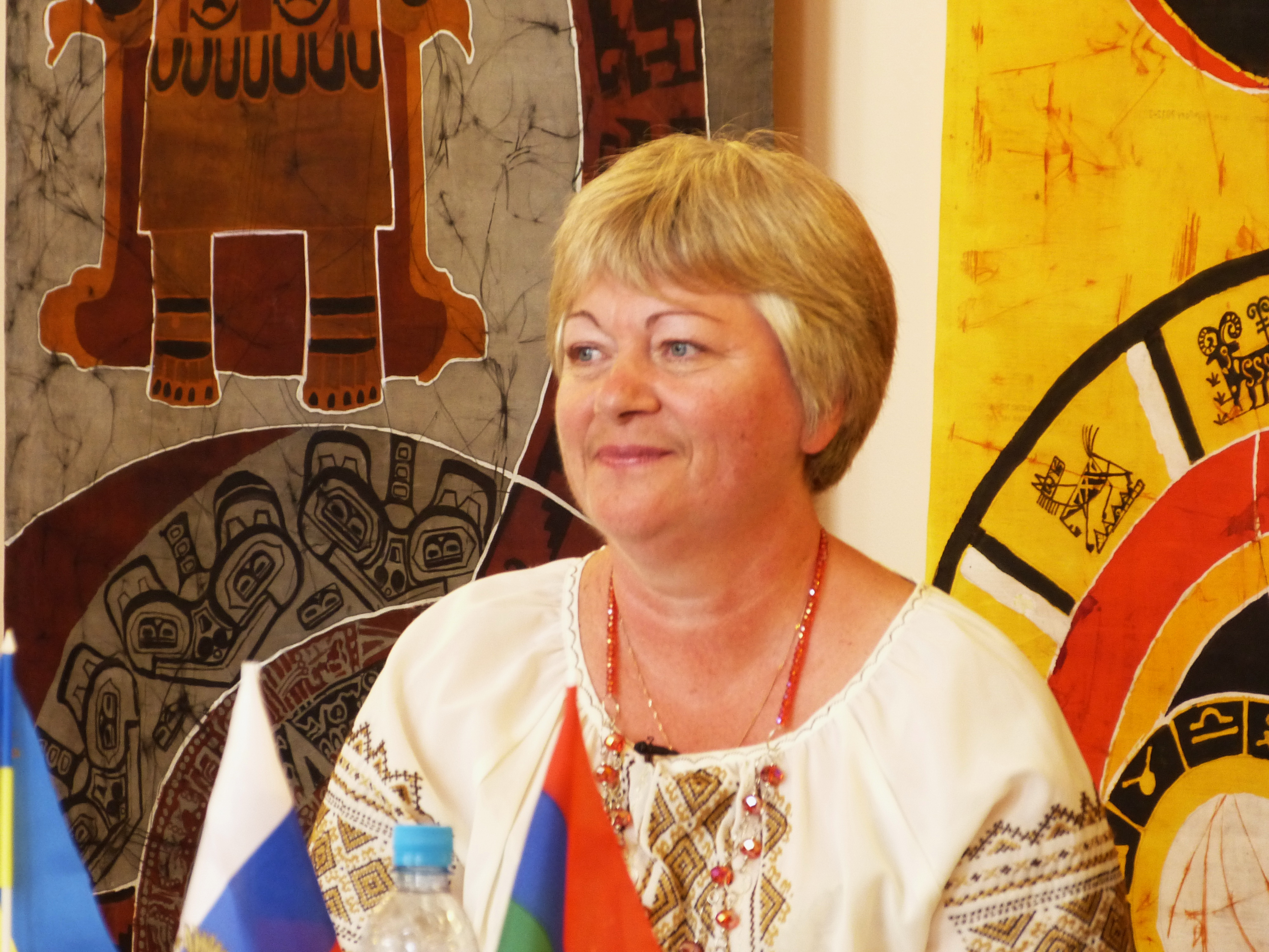 Голова товариства української культури "Калина" Рукавишникова Світлана Володимирівна